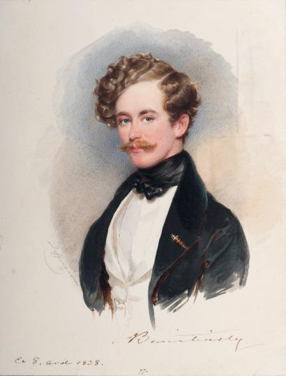 Alexander Bariatinsky (1815—1879).